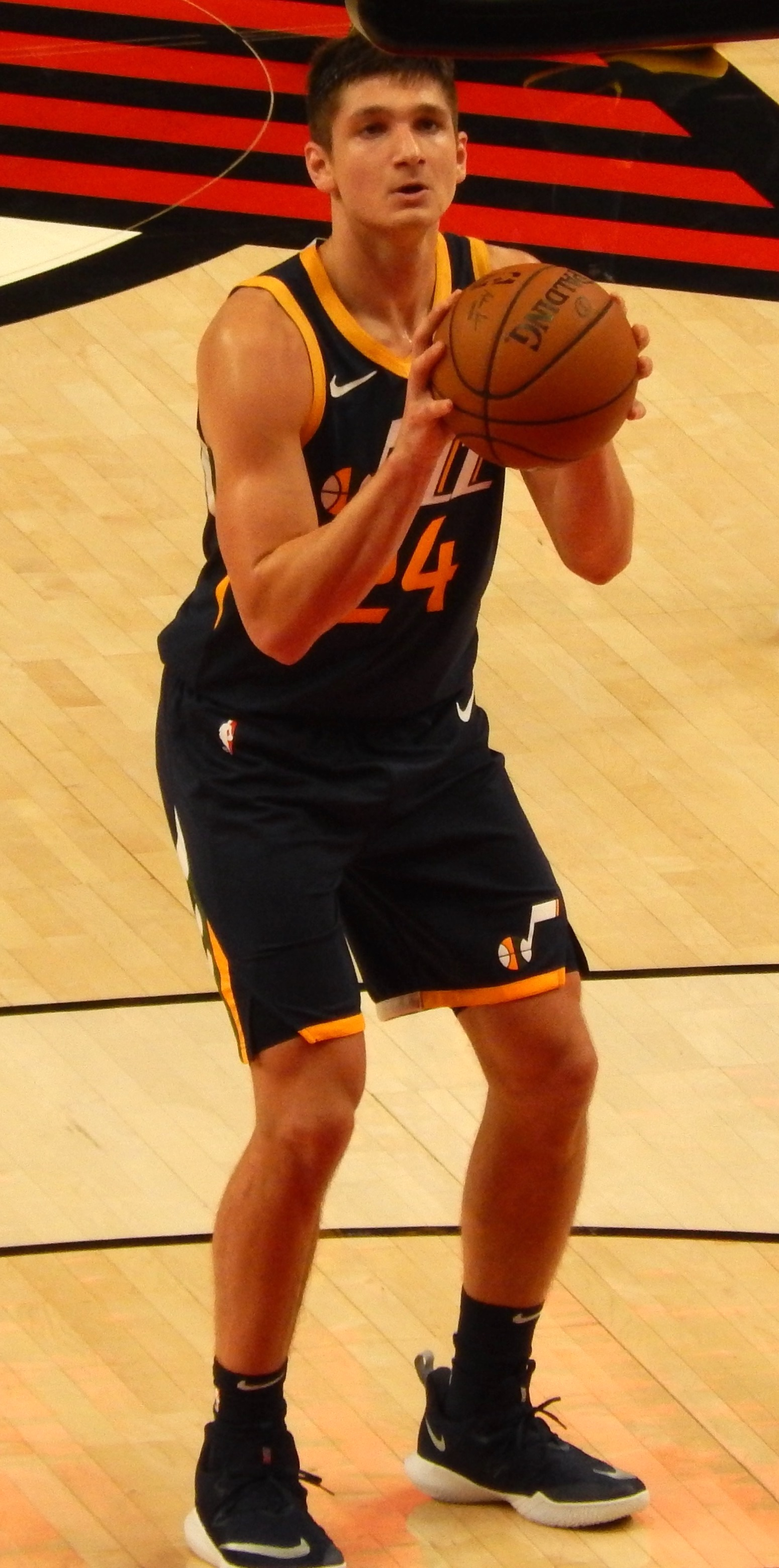 Grayson Allen #24 of the Utah Jazz against the Portland Trail Blazers on October 7, 2018 at Moda Center in Portland, Oregon.